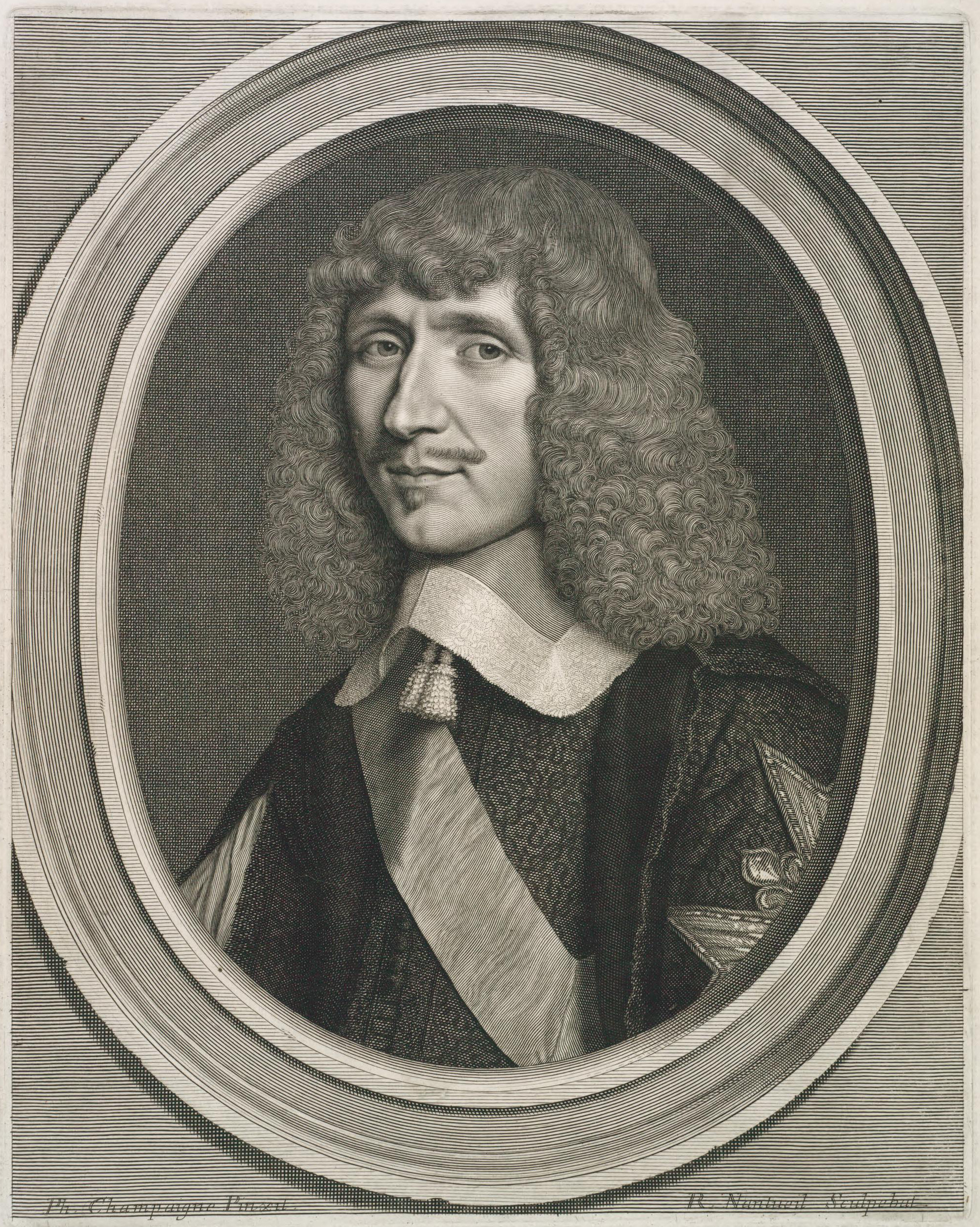 Porträt Léon (Le) Bouthilliers, Außenminister Frankreichs unter Ludwig XIII.